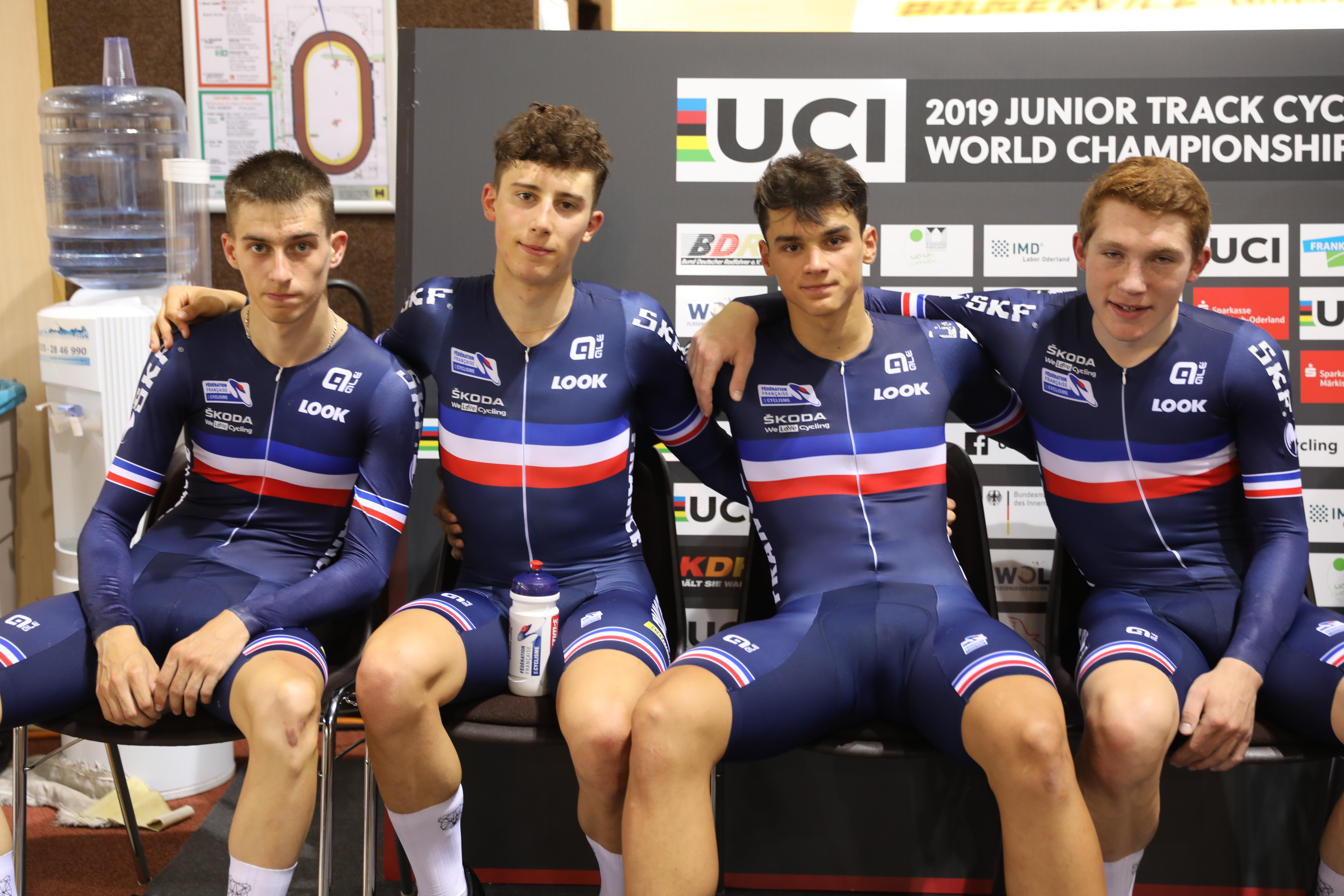 französischer Bahnvierer (v.l.n.r.): Clément Petit, Kévin Vauquelin, Antonin Corvaisier, Florian Pardon